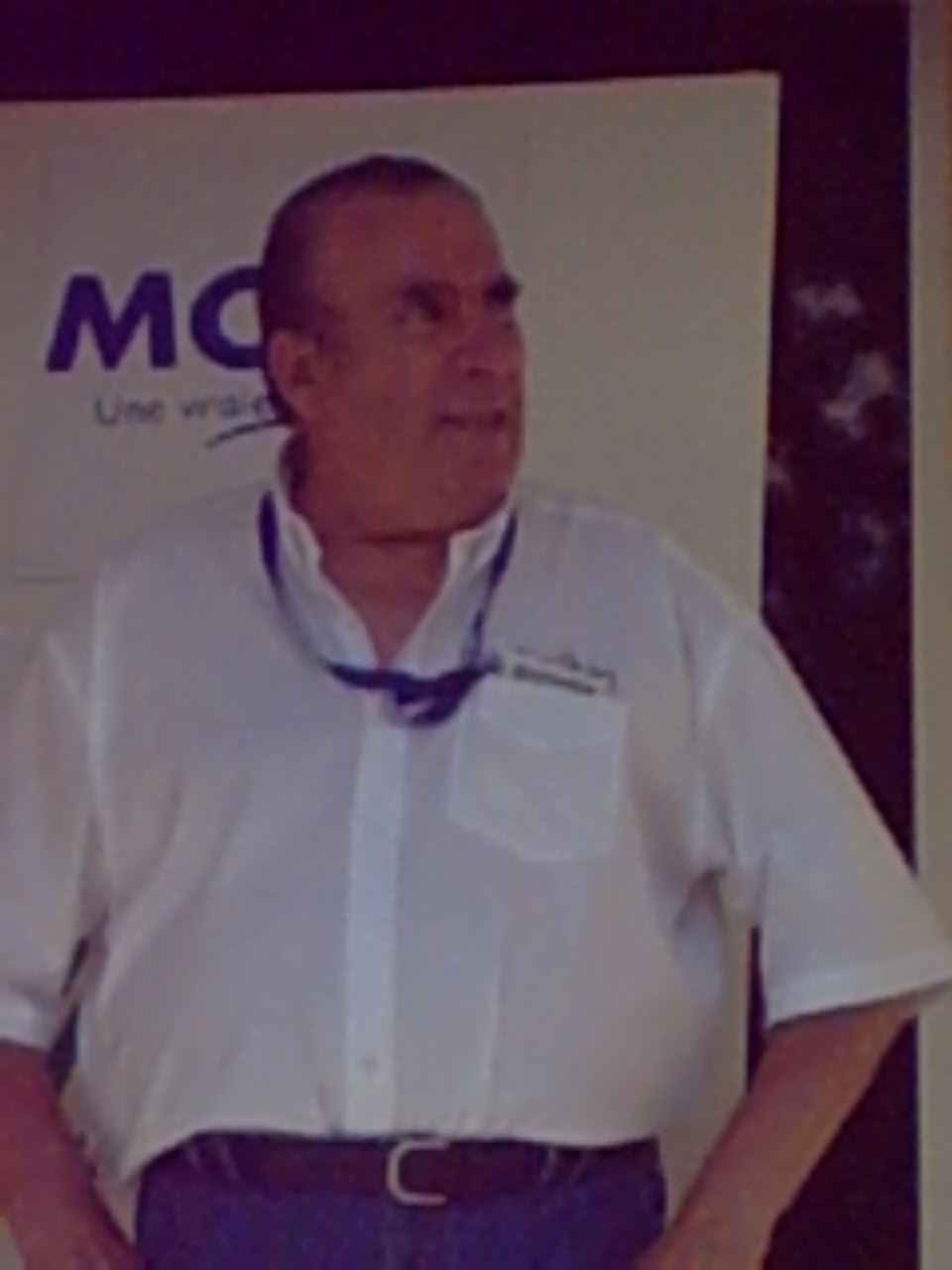 Raphael Géminiani lors de la cérémonie protocolaire à l'issue de l'étape du Tour de l'Ain 2004 arrivant à Oyonnax le 11 août 2004.